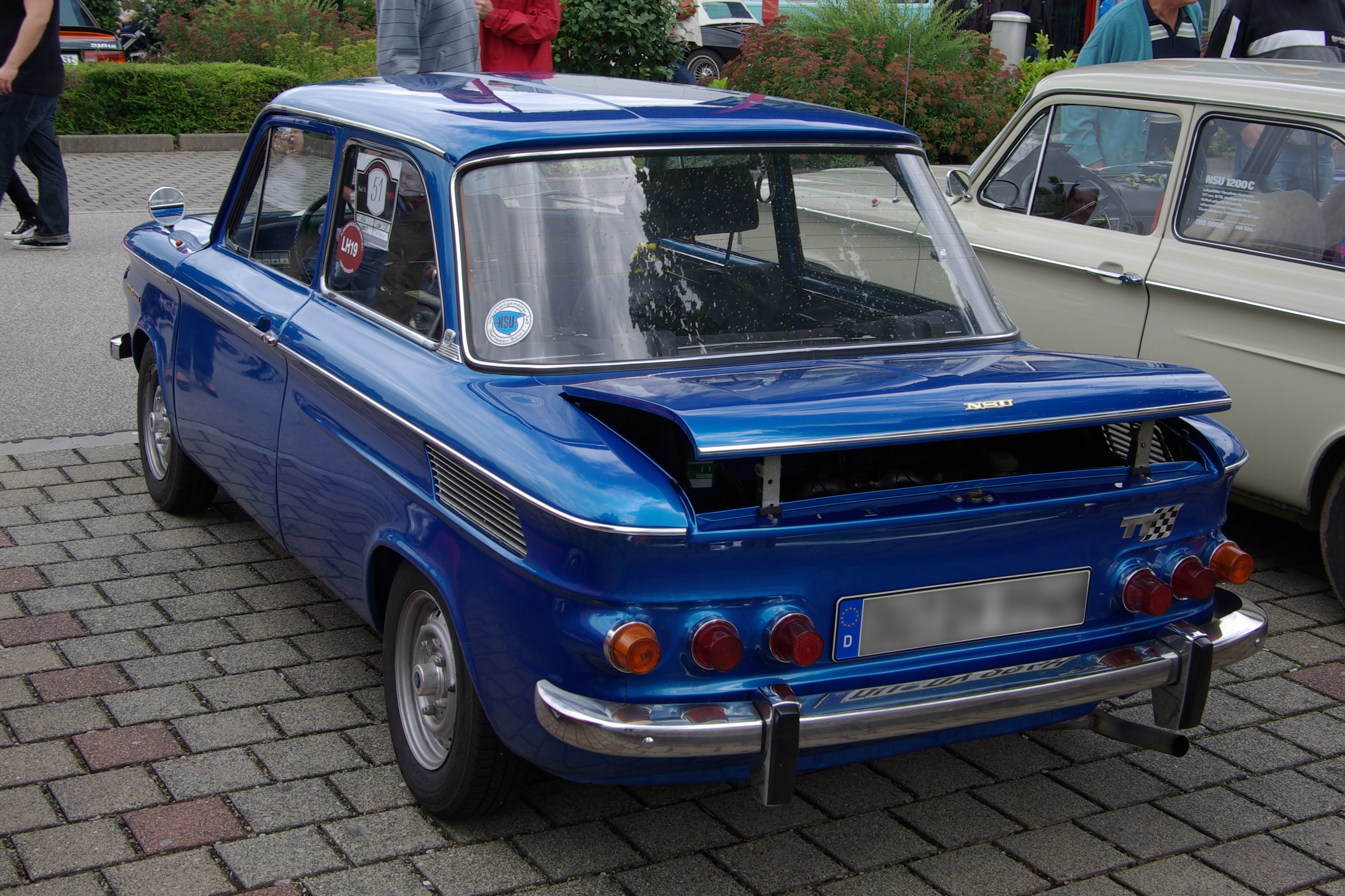 NSU Prinz 1000, 28. Internationales Oldtimer-Treffen, Konz